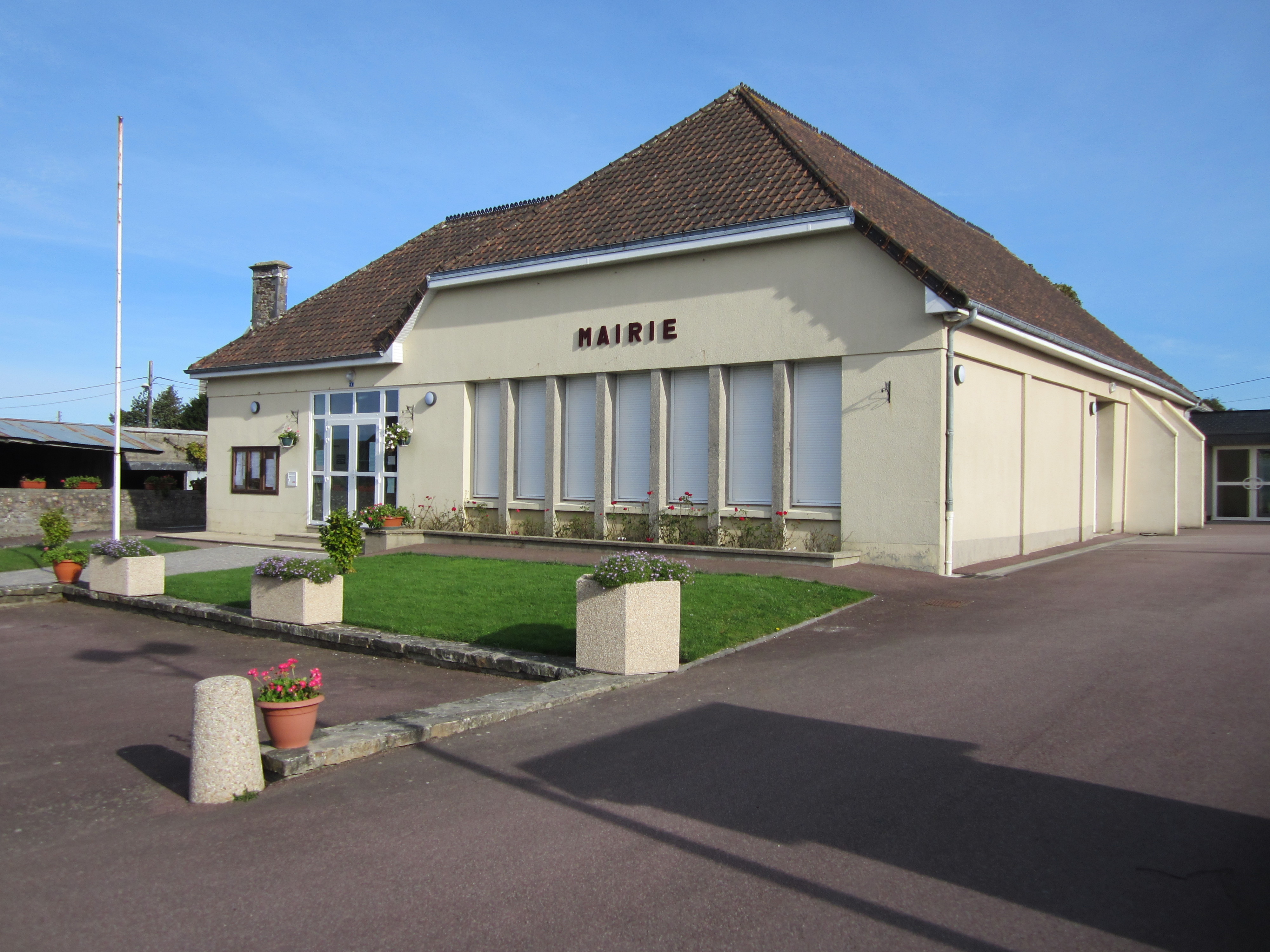 Montsurvent, Manche